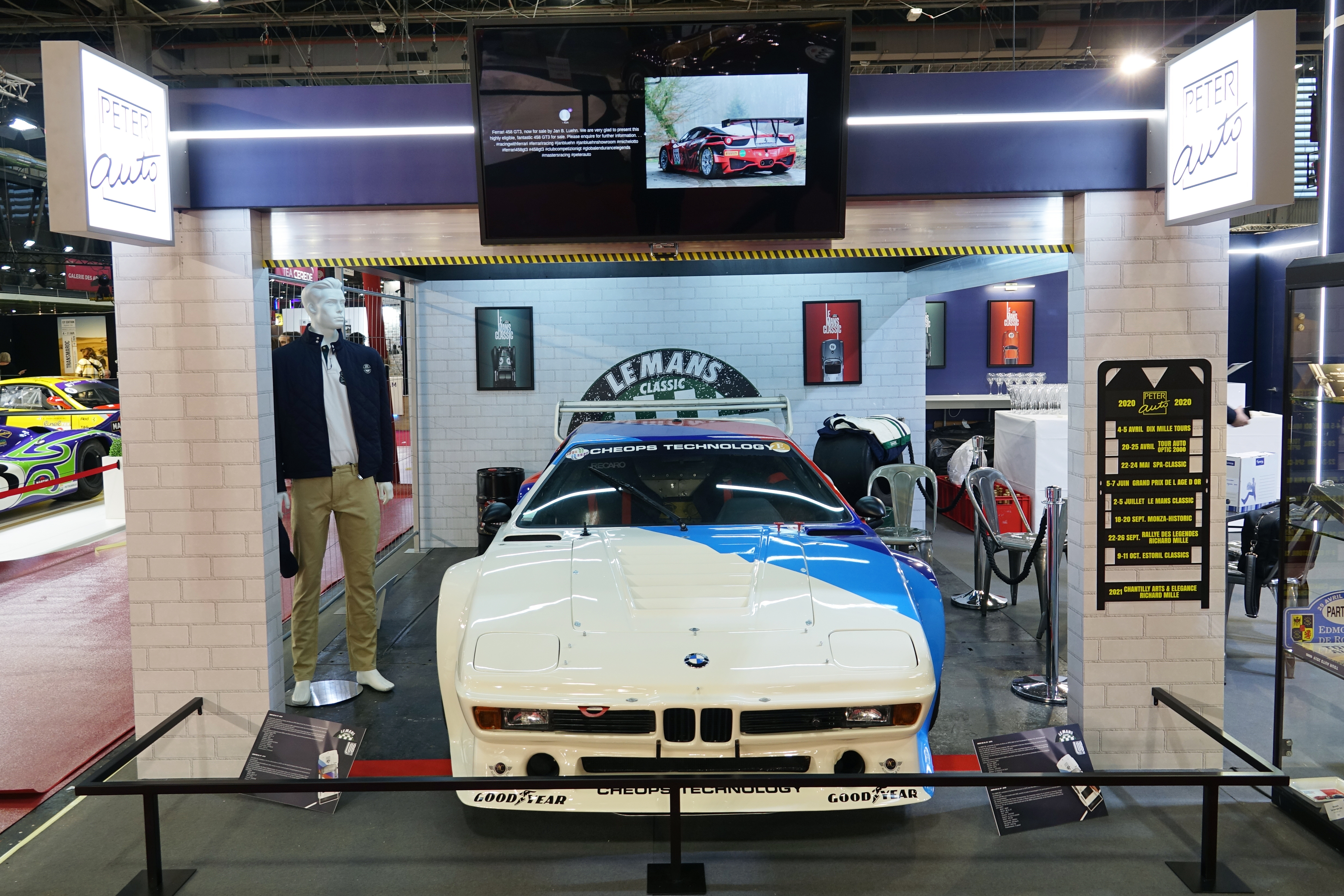 Peter Auto au salon Rétromobile 2020